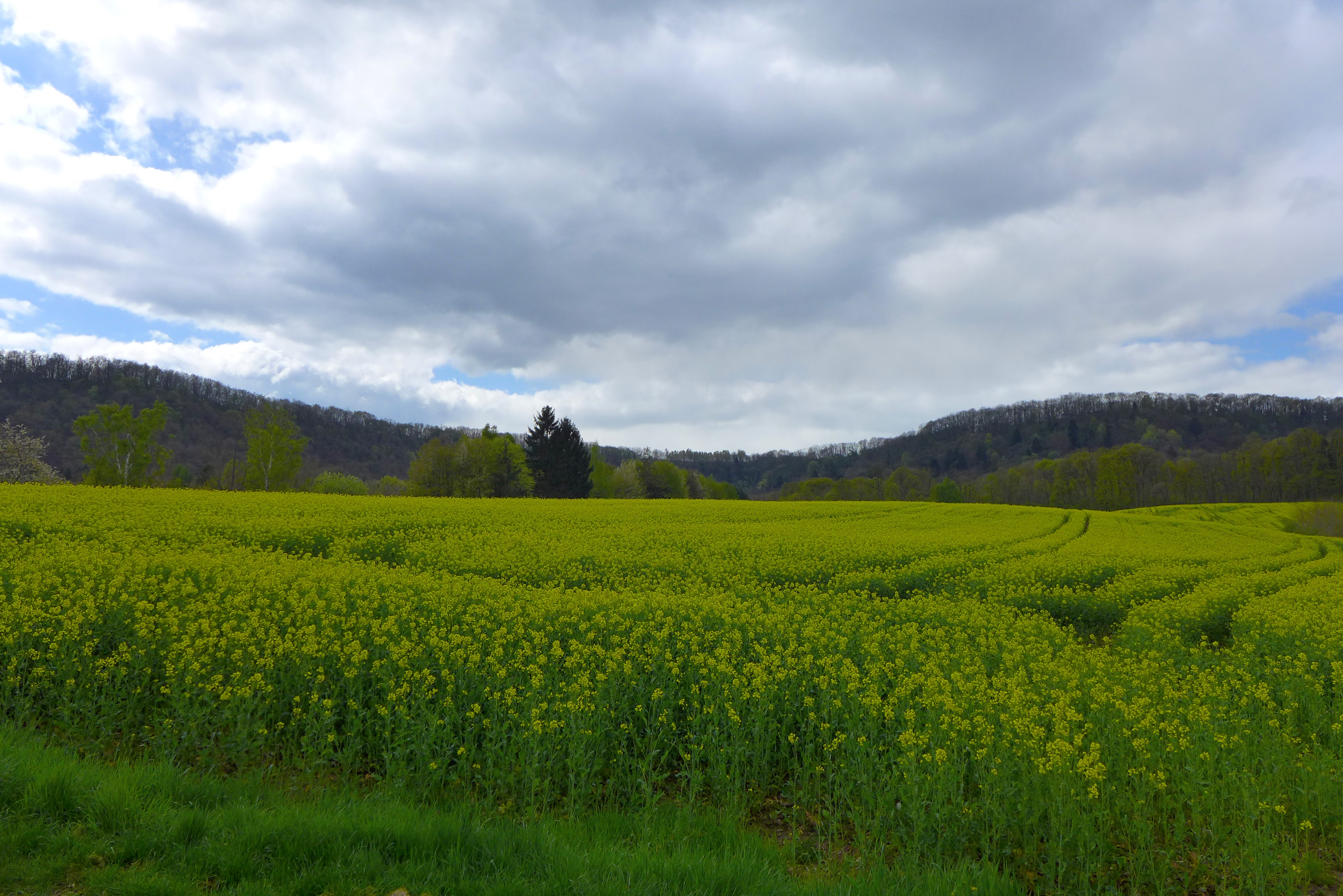 Wallerfangen, Blauloch